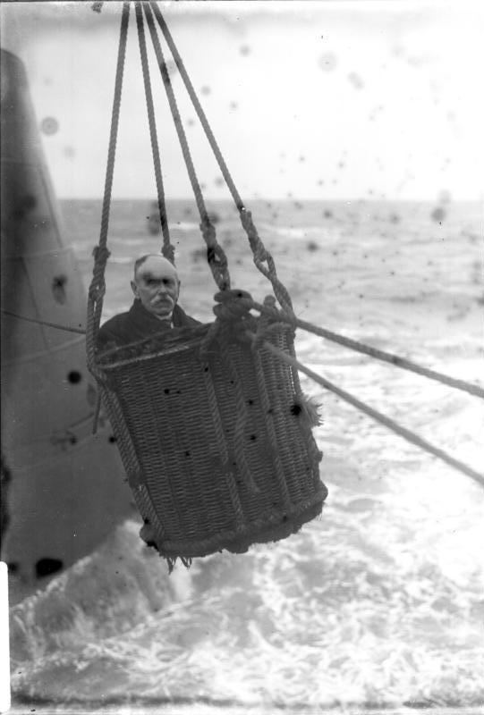 Die gefahrvolle Ablösung und Verproviantierung der Leuchtturmwärter am "Roter-Sand" Leuchtturm in der Nordsee an der Wesermündung bei Bremerhaven! Ein alter Leuchtturmwärter, welcher schon 34 Jahre den verantwortungsvollen Dienst eines Leuchtturmwärters versieht, wird am "Roter Sand" Leuchtturm im Förderkorb zur Ablösung zum Regierungsdampfer gebracht.